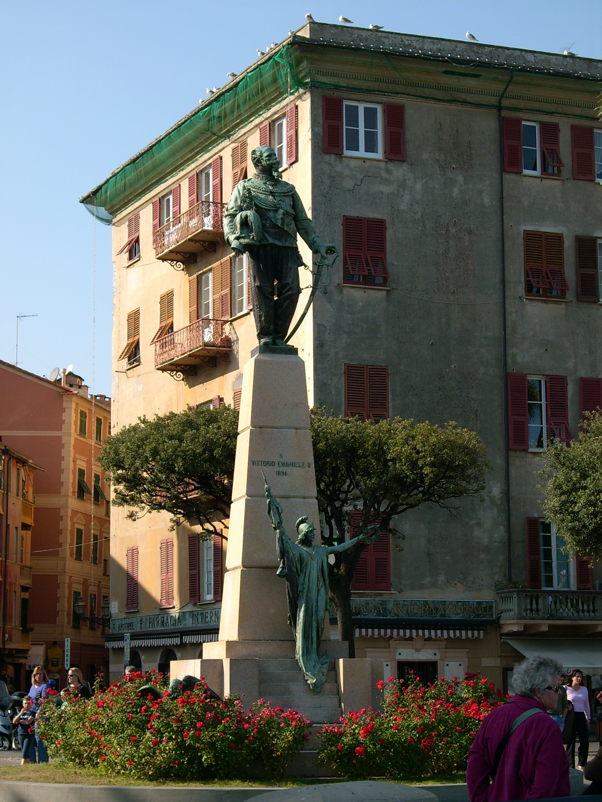 Monumento al re Vittorio Emanuele II di Savoia presso Santa Margherita Ligure, Liguria, Italia